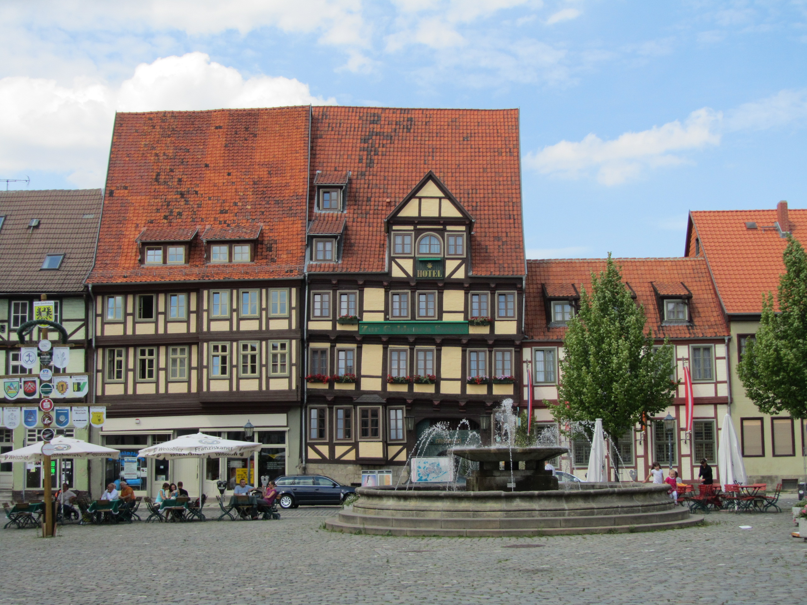 The Hotel Zur Goldenen Sonne in Quedlinburg